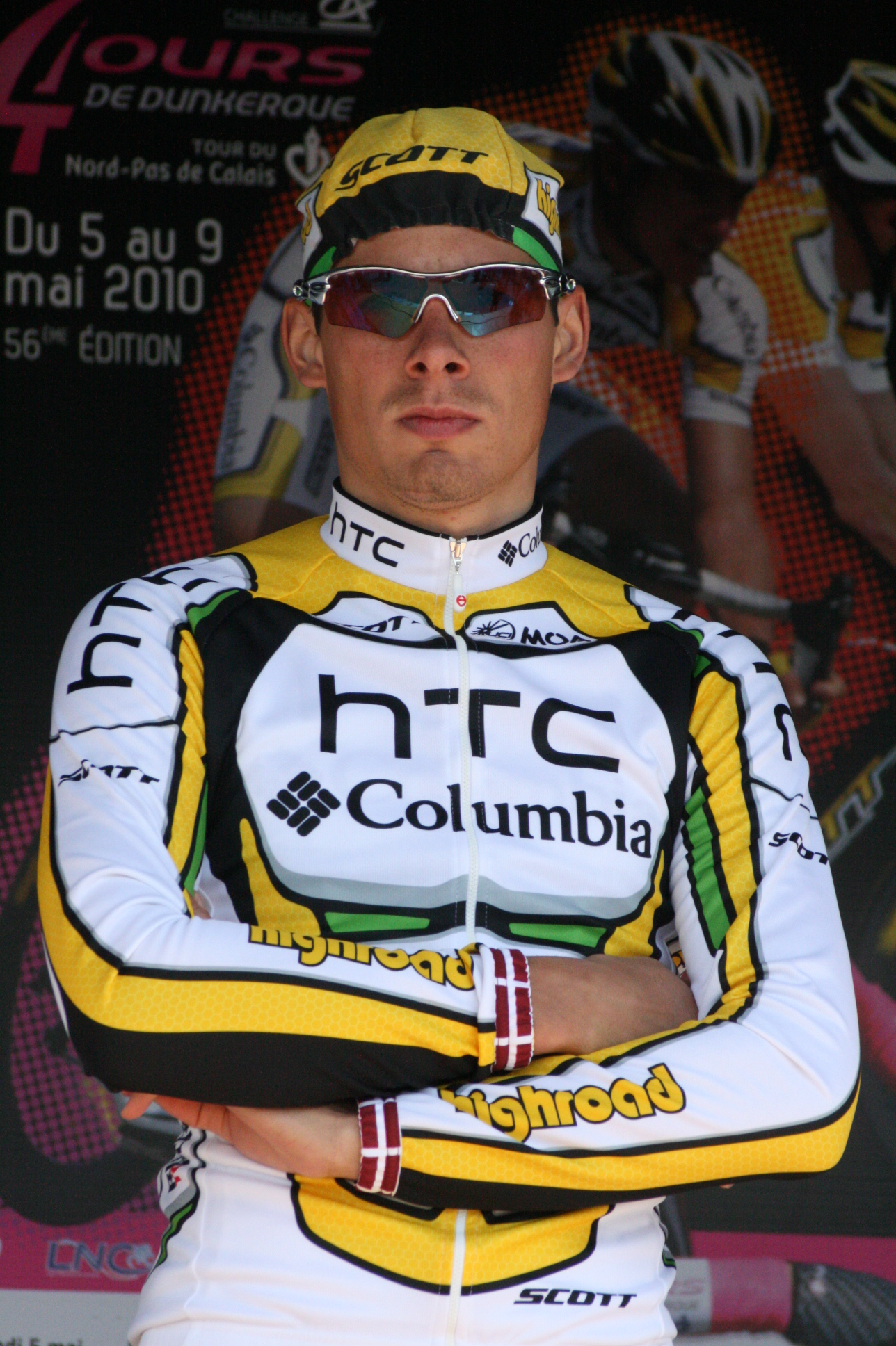 Aleksejs Saramotins, lors de la présentation des équipes des 4 jours de Dunkerque 2010